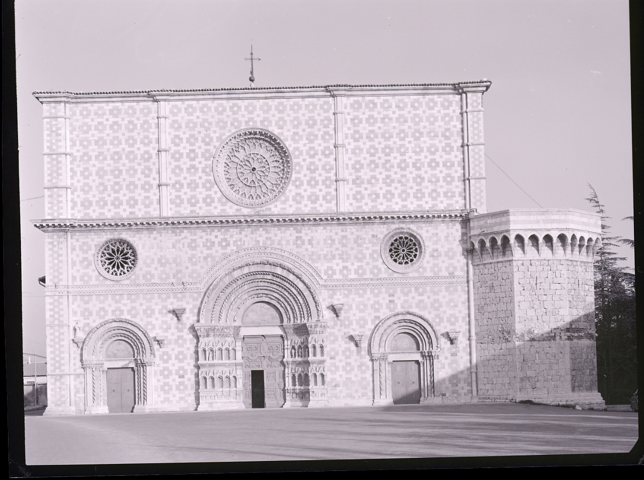 Servizio fotografico : Fabriano, 1969 / Paolo Monti. - Buste: 133, Fototipi: 133 : Negativo b/n, gelatina bromuro d'argento/ pellicola ; 10x12. - ((Serie costituita da 133 buste di carta identificate con i nn.: 15451, 15452, 15453, 15454. 15455, 15456, 15457, 15458, 15459, 15460, 15461, 15462, 15463, 15464, 15465, 15466, 15467, 15468, 15469, 15470, 15471, 15472, 15473, 15474, 15475, 15476, 15477, 15478, 15479, 15479bis, 15480, 15481, 15482fabriano, 15483, 15484, 15485, 15486, 15487, 15487bis, 15488, 15488bis, 15489, 15489bis, 15490, 15491, 15492, 15493, 15494, 15495, 15496, 15497, 15498, 15498bis, 15499, 15500, 15501, 15501bis, 15502, 15502bis, 15503, 15503bis, 15503 2°bis, 1550415504bis, 15504bis2, 15505, 15505bis, 15506, 15506bis, 15507, 15508, 15509, 15510, 15510bis, 15511, 15512, 15513, 15514, 15514bis, 15515, 15516, 15516bis, 15517, 15518, 15519, 15520, 15521, 15522, 15523, 15524, 15525, 15526, 15527, 15528, 15528bis, 15529, 15530, 15530bis, 15531, 15531bis, 15532, 15533, 15533bis, 15534, 15535, 15536, 15537, 15538, 15538bis, 15539, 15540, 15541, 15541bis, 15542, 15543, 15544, 15545, 15546, 15546bis, 15547, 15548, 15549, 15550. - Confronta: 014Gpbn15485-15490; 015Gpbn15491-15497. - Occasione: Documentazione per la pubblicazione: "TOURING CLUB ITALIANO, Marche, Milano, TCI, 1971". - Fonte: Agenda di Paolo Monti: Monti/ 3 aprile 1966 - 9 marzo 1971/ 12421-16823 (1966-1971), presso Archivio Paolo Monti